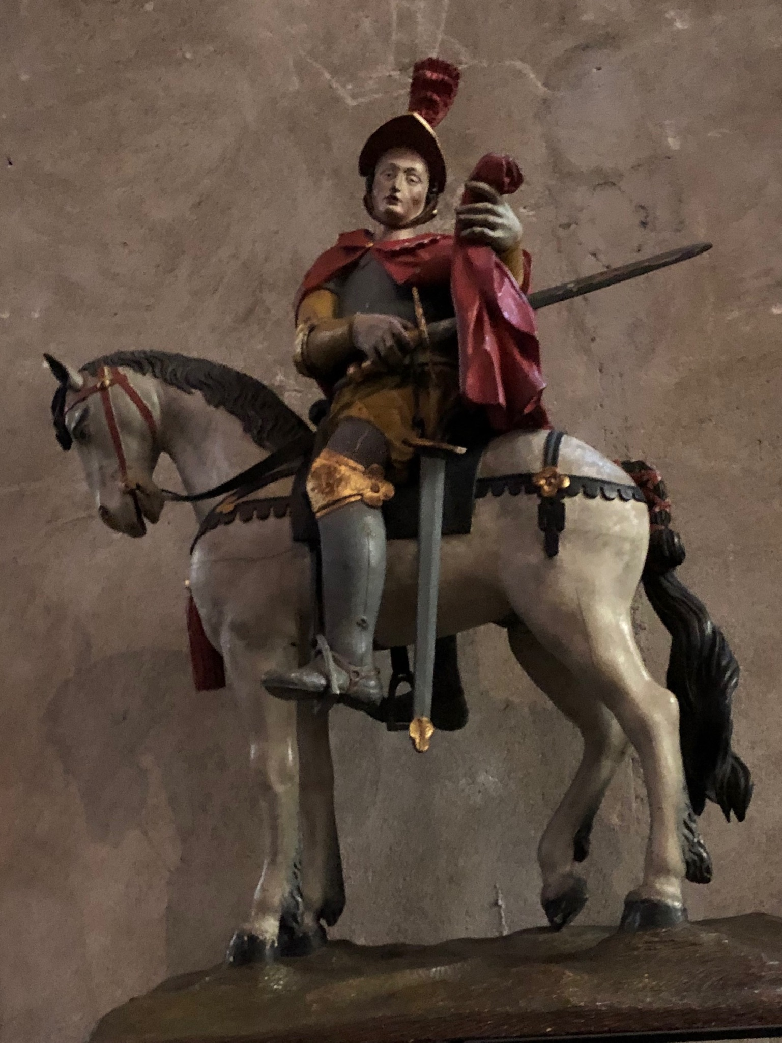 Figur des Hl. Martin aus Martinskirche in Venlo, Niederlande